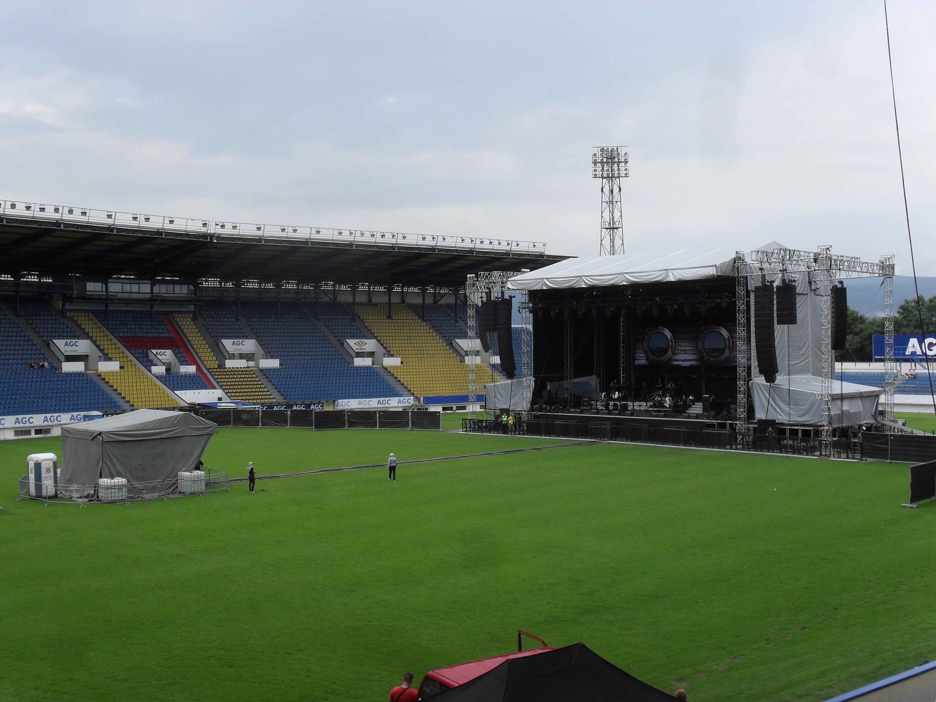 Teplický fotbalový stadión, 8. června 2013 zde proběhl koncert skupiny Kabát.